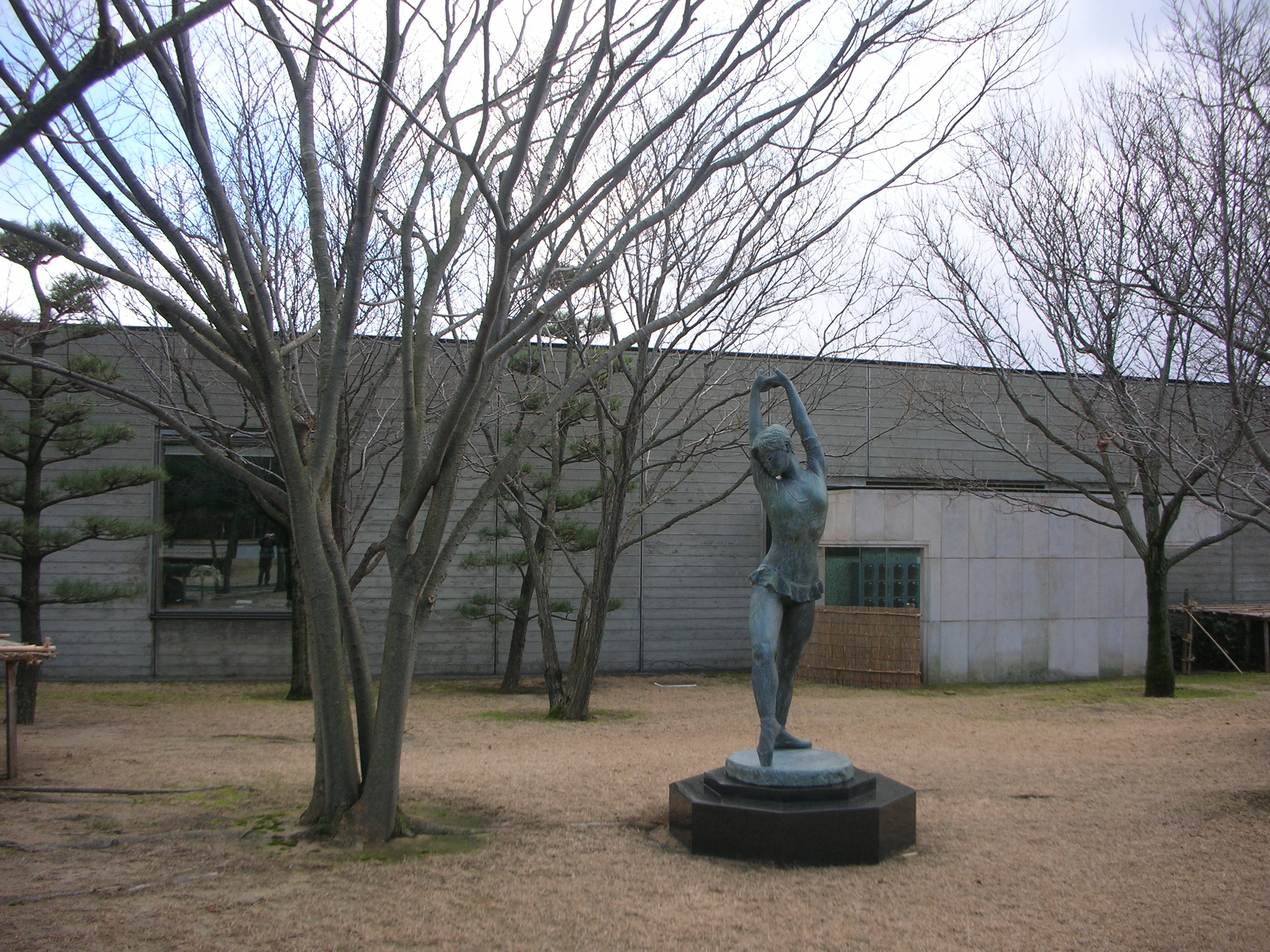 酒田市美術館入り口